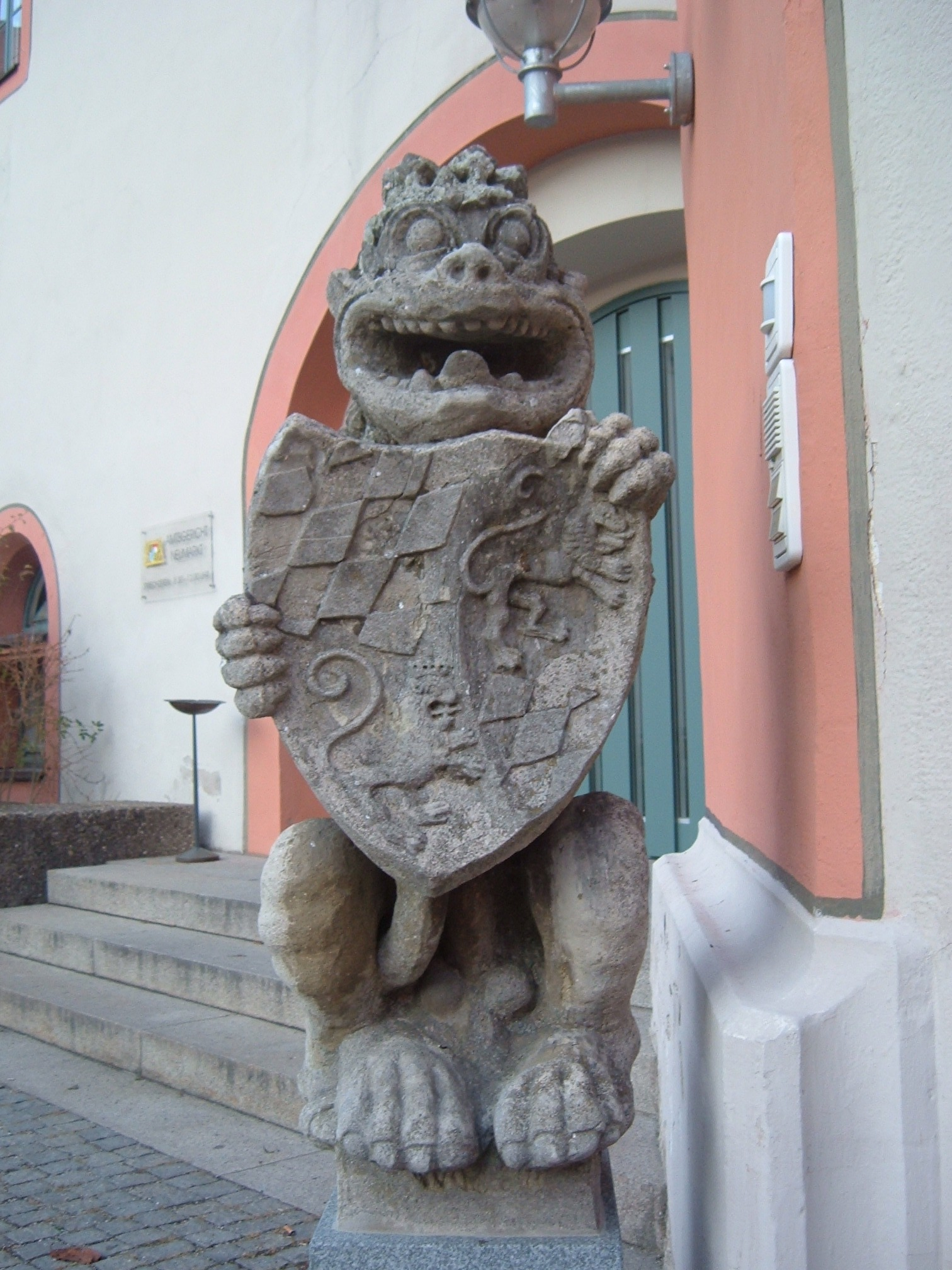 Steinlöwe mit Wappenschild am Eingang des Pfalzgrafenschloß Neumarkt